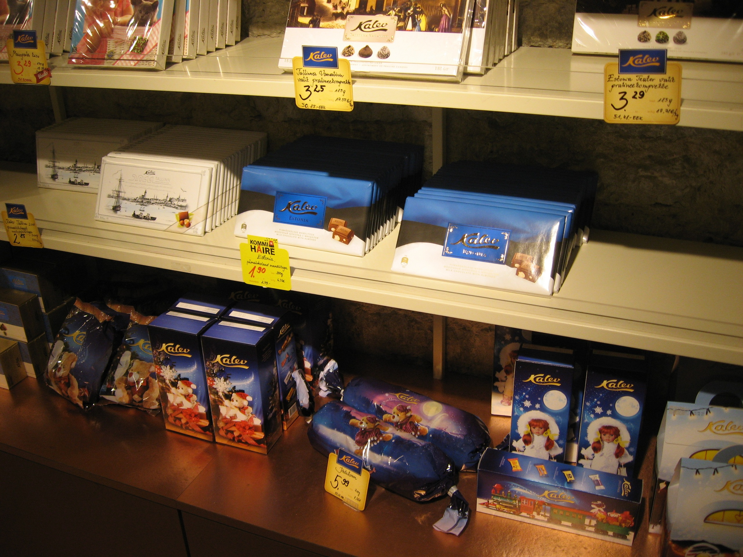 Kalevi šokolaadipoed